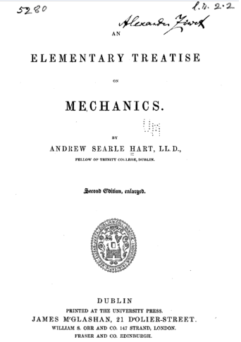 Portada del Tractat de Macànica (1847) publicat per Andrew Searle Hart (1811-1890)